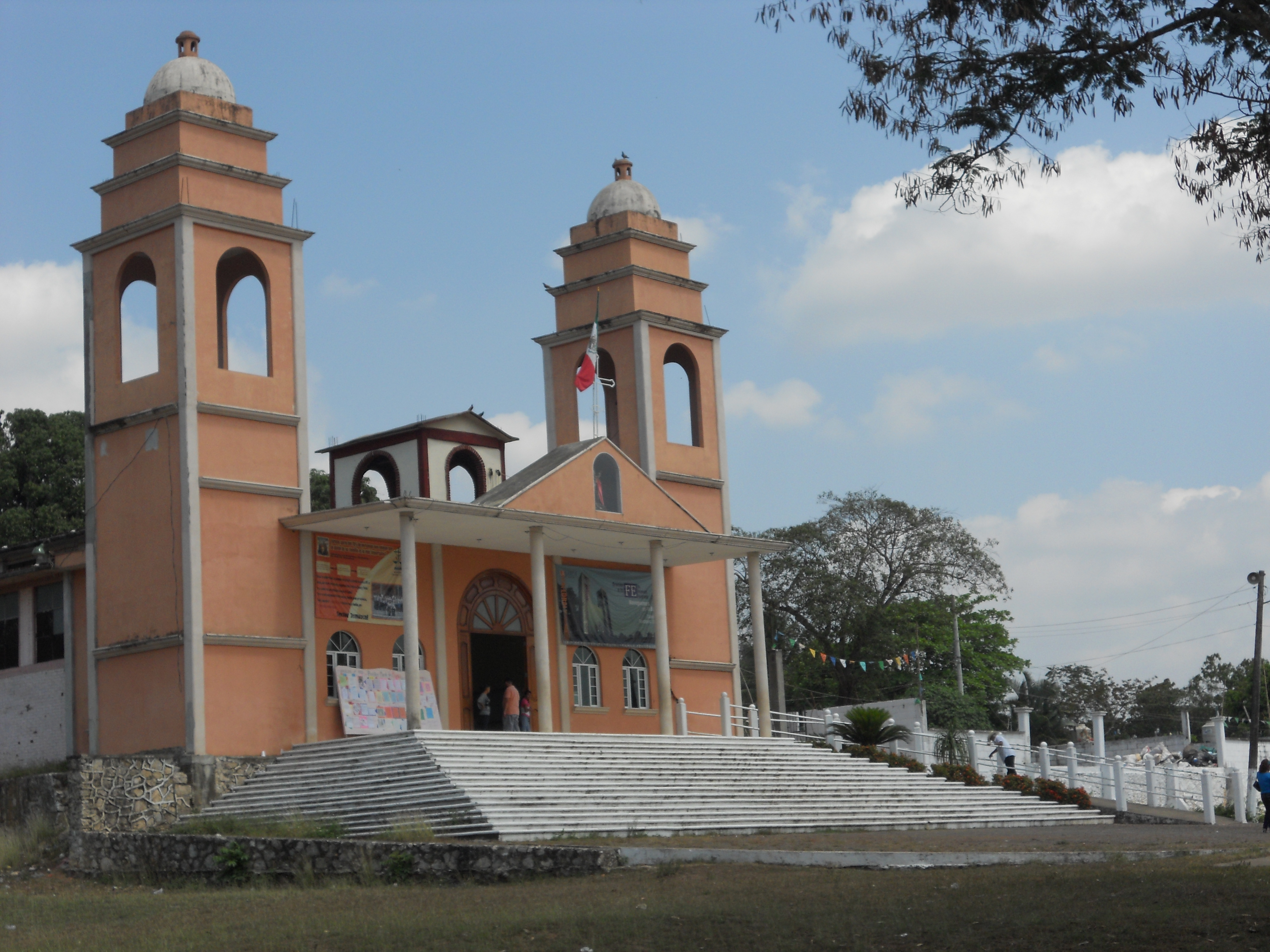 Toma de la fachada de la iglesia de Temascal en San Miguel Soyaltepec